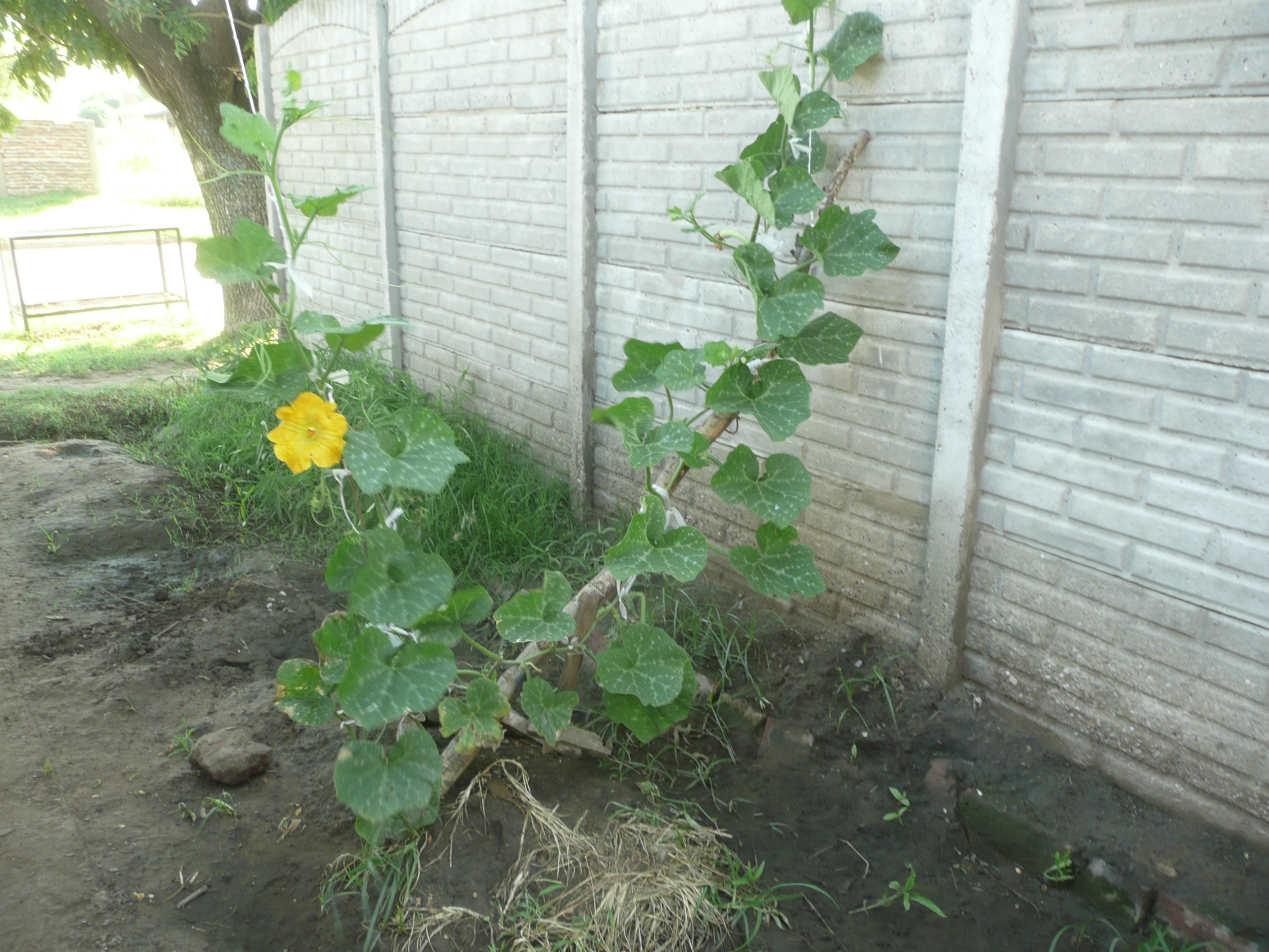 Fortín Olavarría, Buenos Aires province, Argentina.